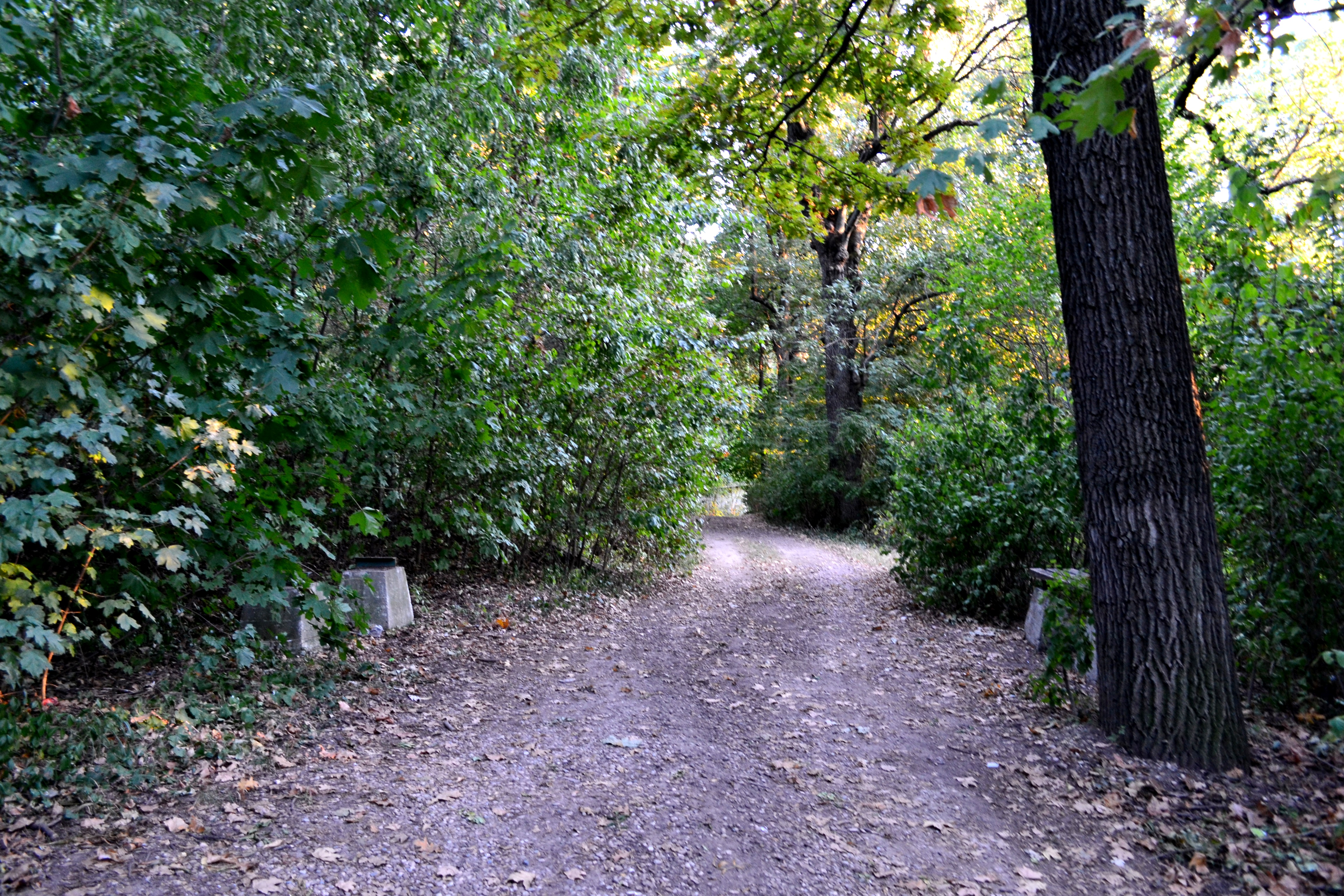 Parc Urlați 05